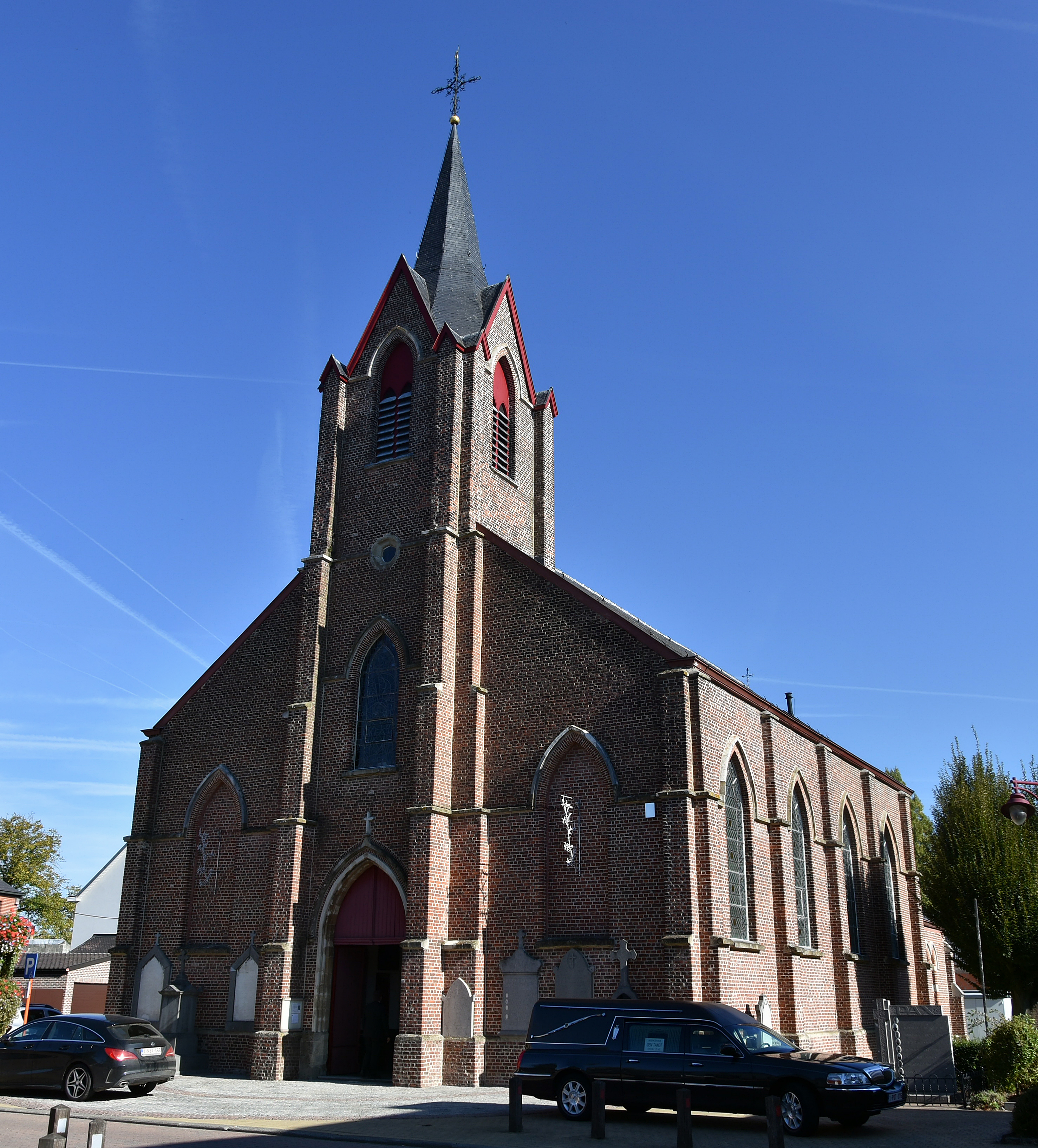 Sint-Martinuskerk Bambrugge (8269) 5-10-2018 This photo of immovable heritage has been taken in the Flemish Region